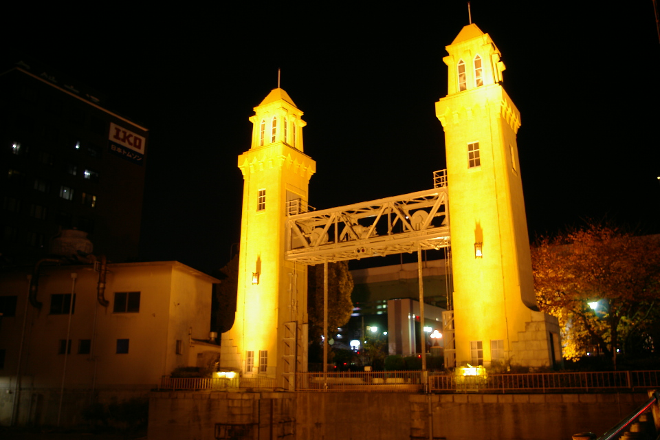 松重閘門（名古屋市中川区） 夜間ライトアップ中の松重閘門（中川運河側より）